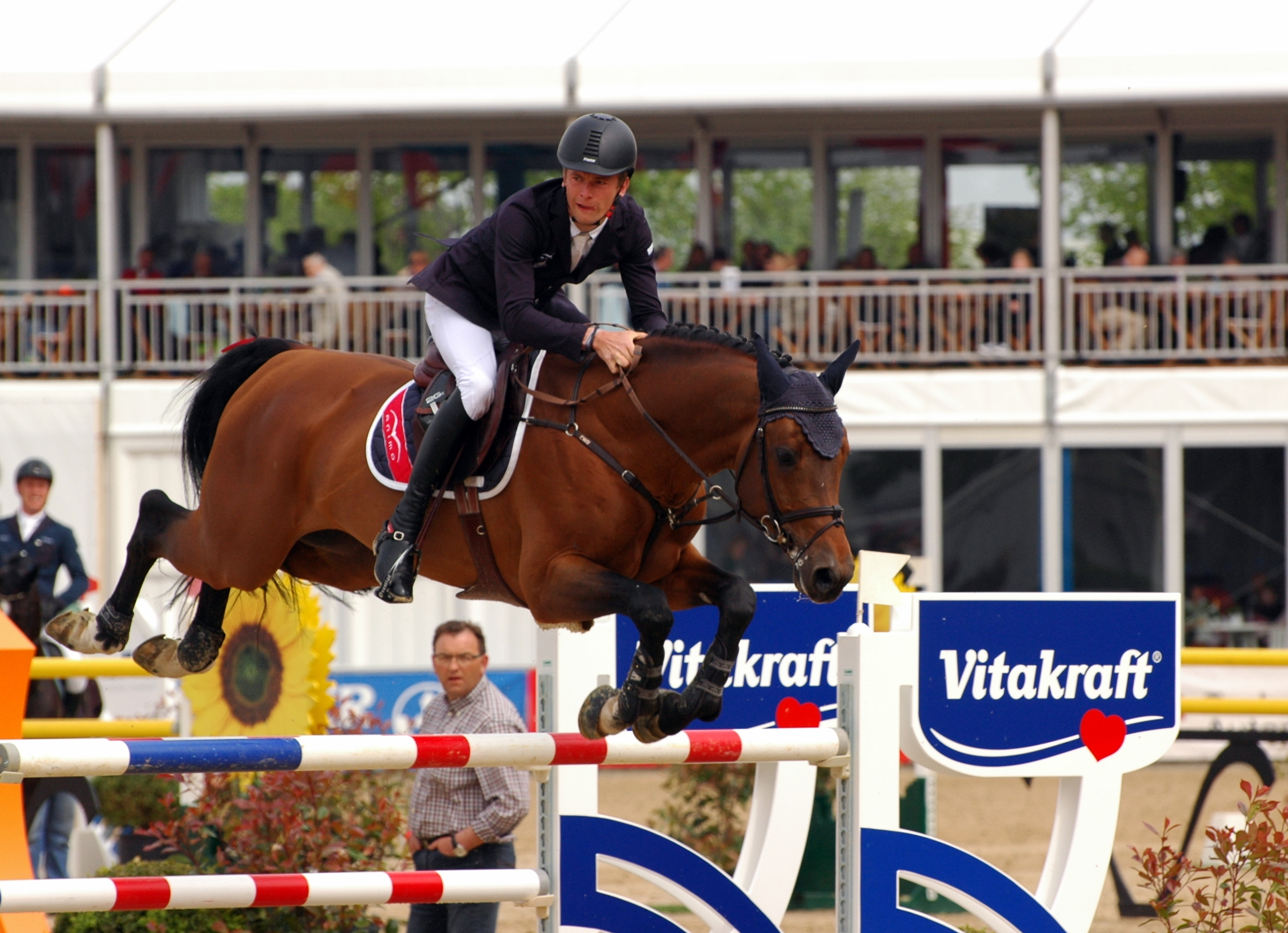 52. Maimarkt-Turnier, Patrick Stühlmeyer auf Lacan